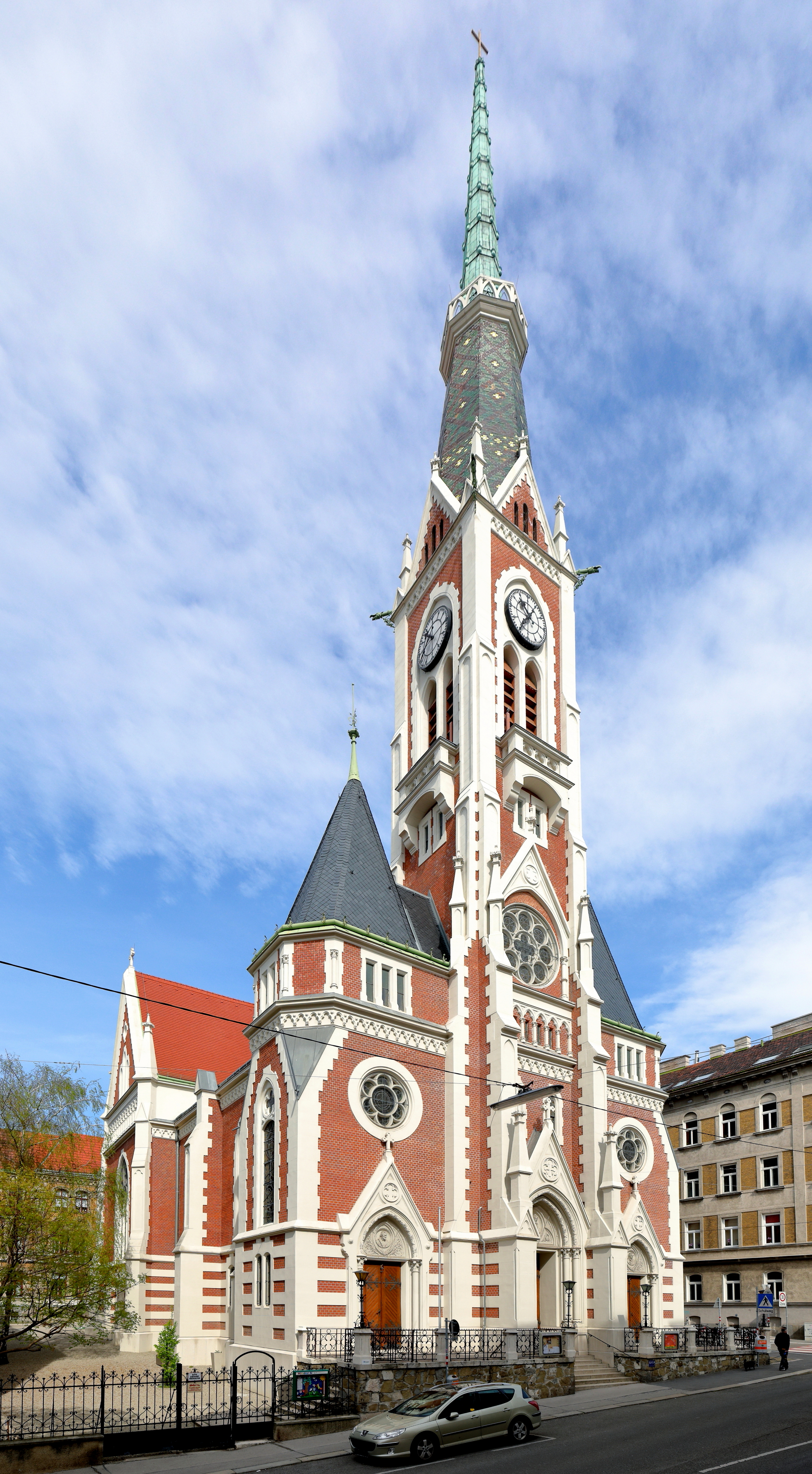 Die Lutherkirche im 18. Wiener Gemeindebezirk Währing.Nachdem zuvor die Architekten Theodor Bach und Ludwig Schöne den Pfarrhof „Lutherhof“ errichteten (1894/1895), bauten sie im Anschluss die Kirche. Ab Juli 1896 begann man mit den Arbeiten der Erdaushebungen. Die Grundsteinlegung der Kirche mit einem kreuzförmigen Grundriss und einem dreischiffigen Langhaus fand am 7. April 1897 statt und am 2. Dezember 1898, dem 50. Jahrestag der Thronbesteigung Kaiser Franz Joseph I., wurde sie als „Evangelische Kaiser-Franz-Joseph-Jubiläumskirche“ eingeweiht. Nach dem I. Weltkrieg erfolgte die Umbenennung in „Lutherkirche“. Sie war die dritte evangelische Kirche A.B. in Wien und die erste mit Turm (64 Meter hoch) und Glocke.